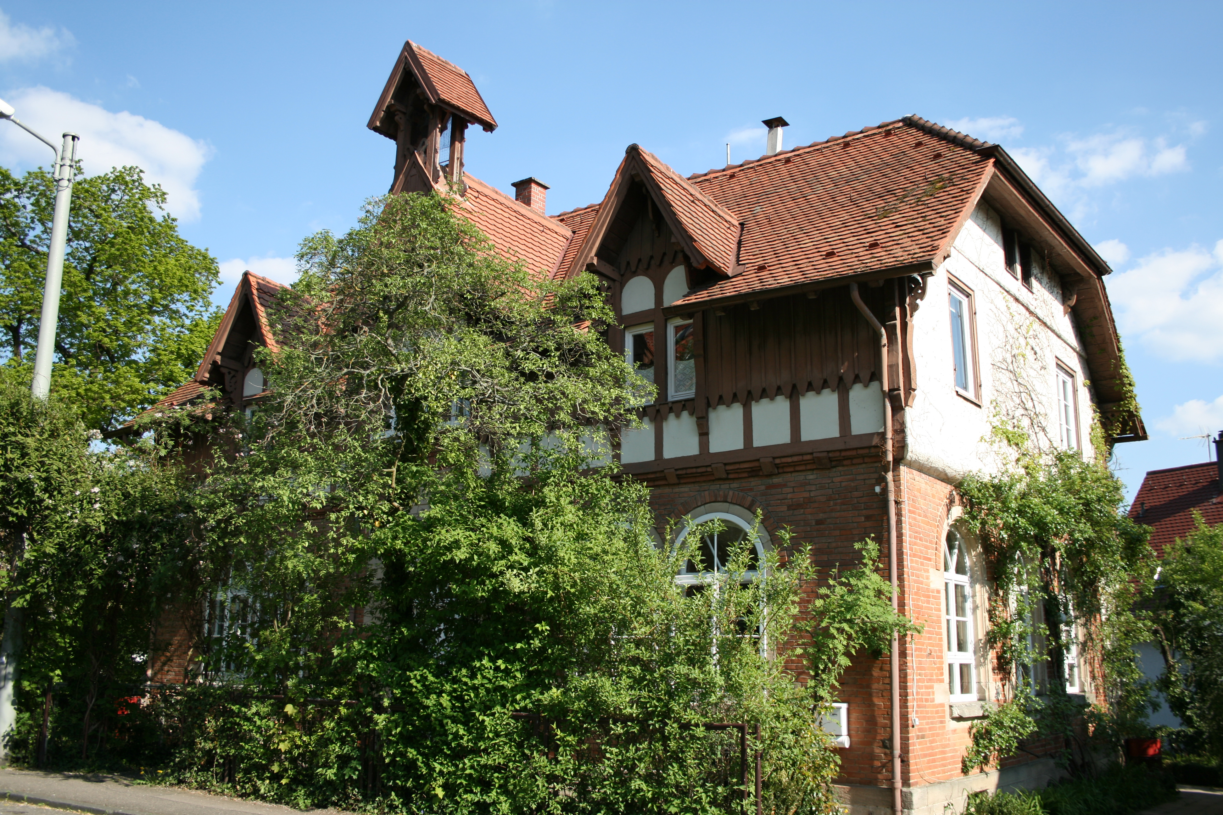 Hausvorderseite, Geschützt nach § 2 DSchG